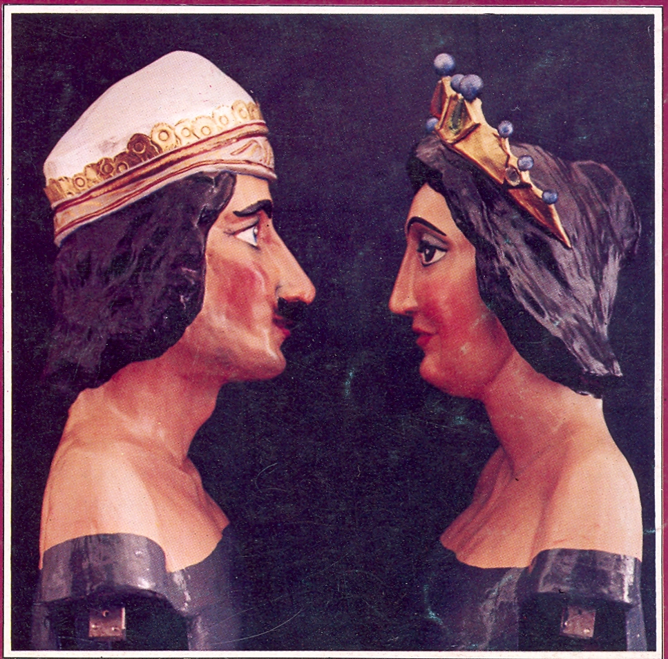 Els gegants de Castellò d'Empúries: Ponç I i la seva muller Adelaida de Besalú